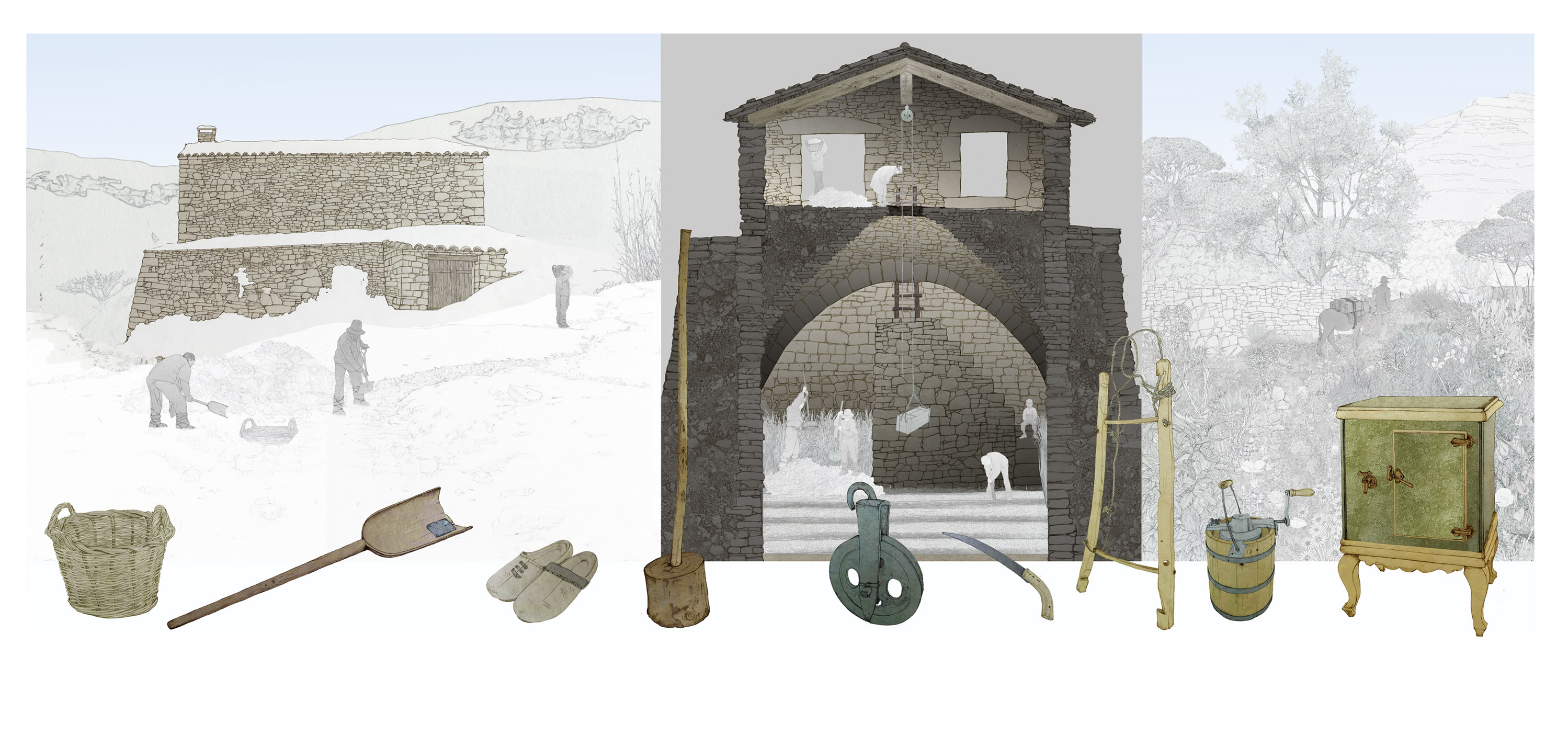 Il·lustracions d'Andrés Marín Jarque per a l'exposició permanent "Secà i Muntanya" del Museu Valencià d'Etnologia. S'il·lustren els escenaris del medi rural i el procés (treball) mitjançant el qual s'aprofita este espai.